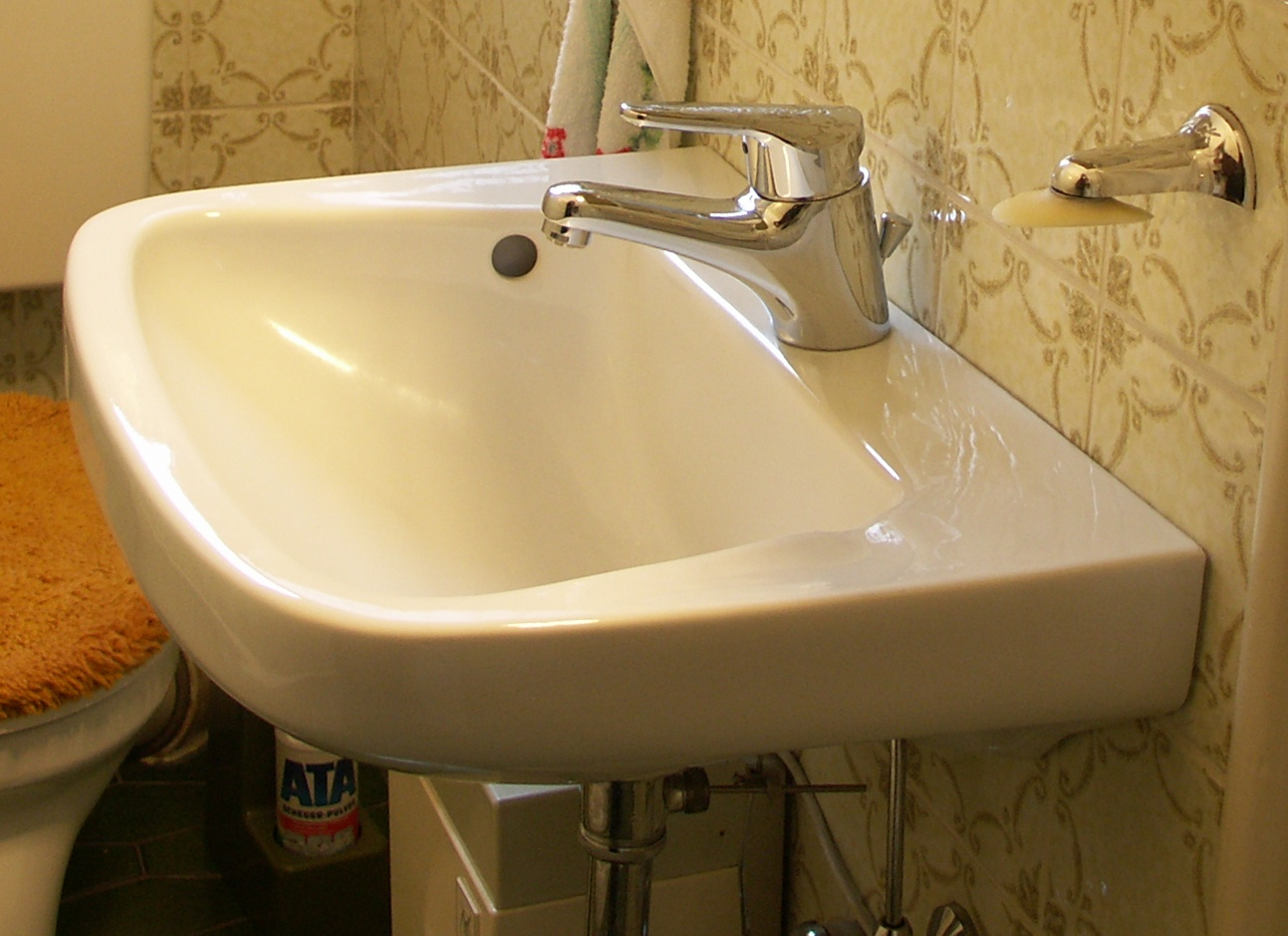 Waschbecken